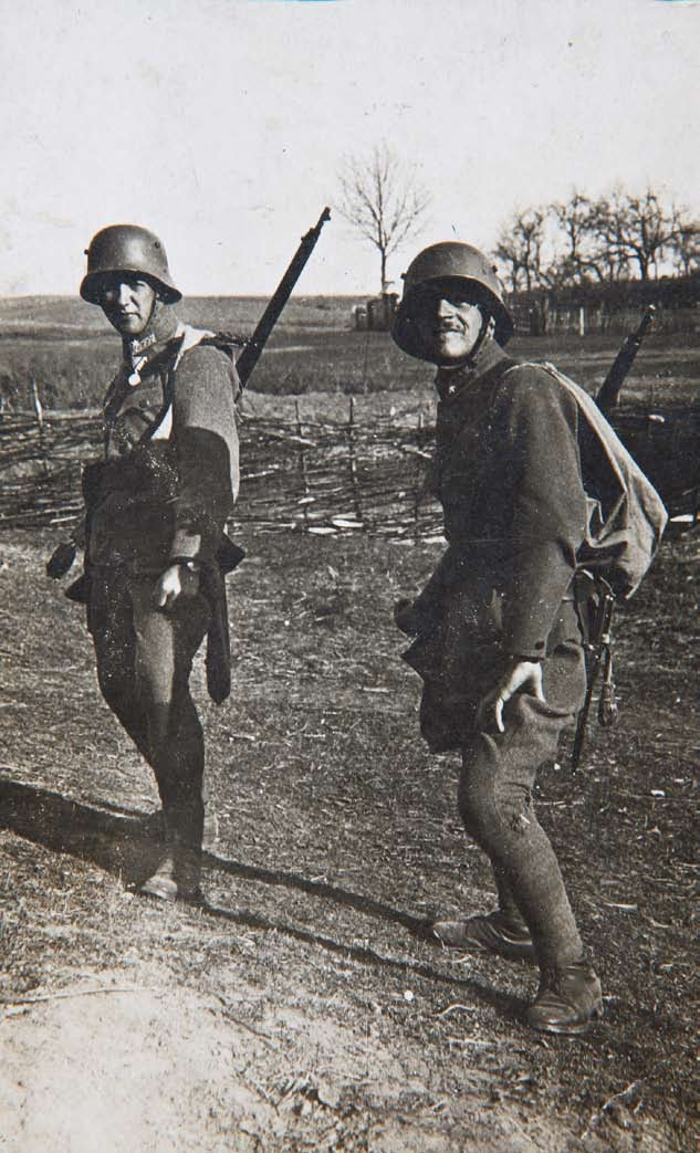 Vojaka 97. pehotnega polka na vzhodni fronti 1917